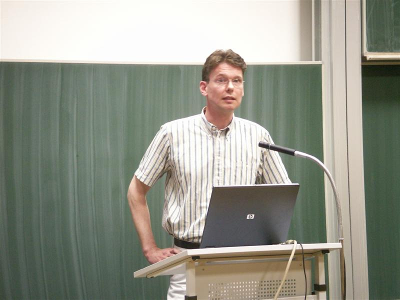 Prof. Dr. Jörg Luy